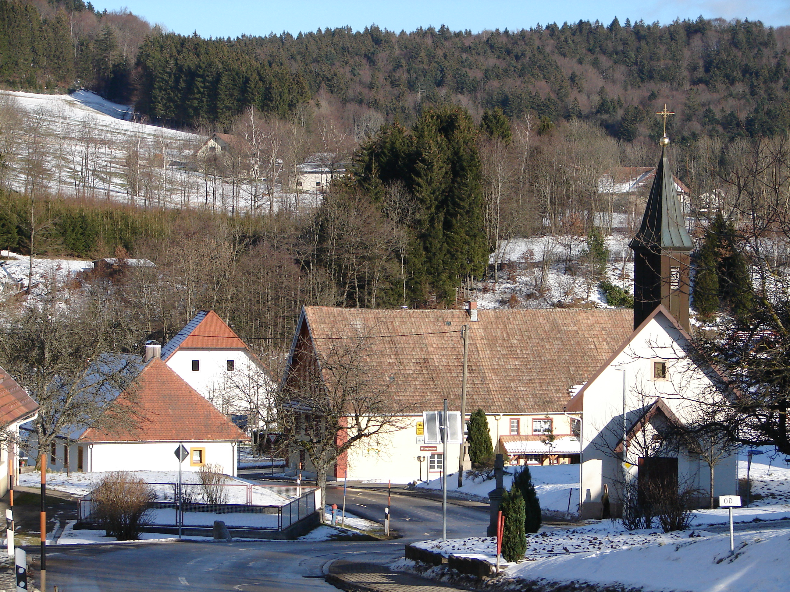 Die Hohlgasse in Hottingen aus der Richtung von Rickenbach kommend nach Hottingen hinein. Zu sehen ist die Kapelle und dahinter das Gasthaus Sonne, eine ehemalige Postkuschenstation.